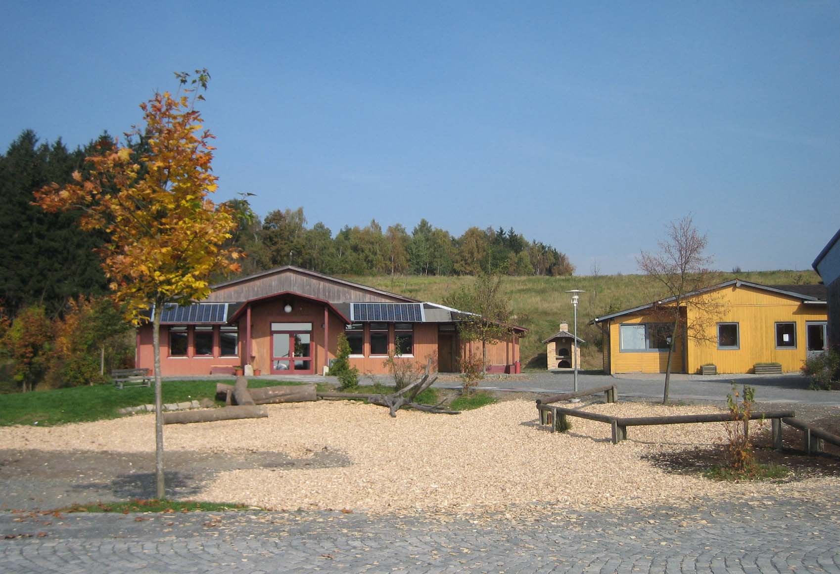 Schulgebäude der Freien Waldorfschule Hof